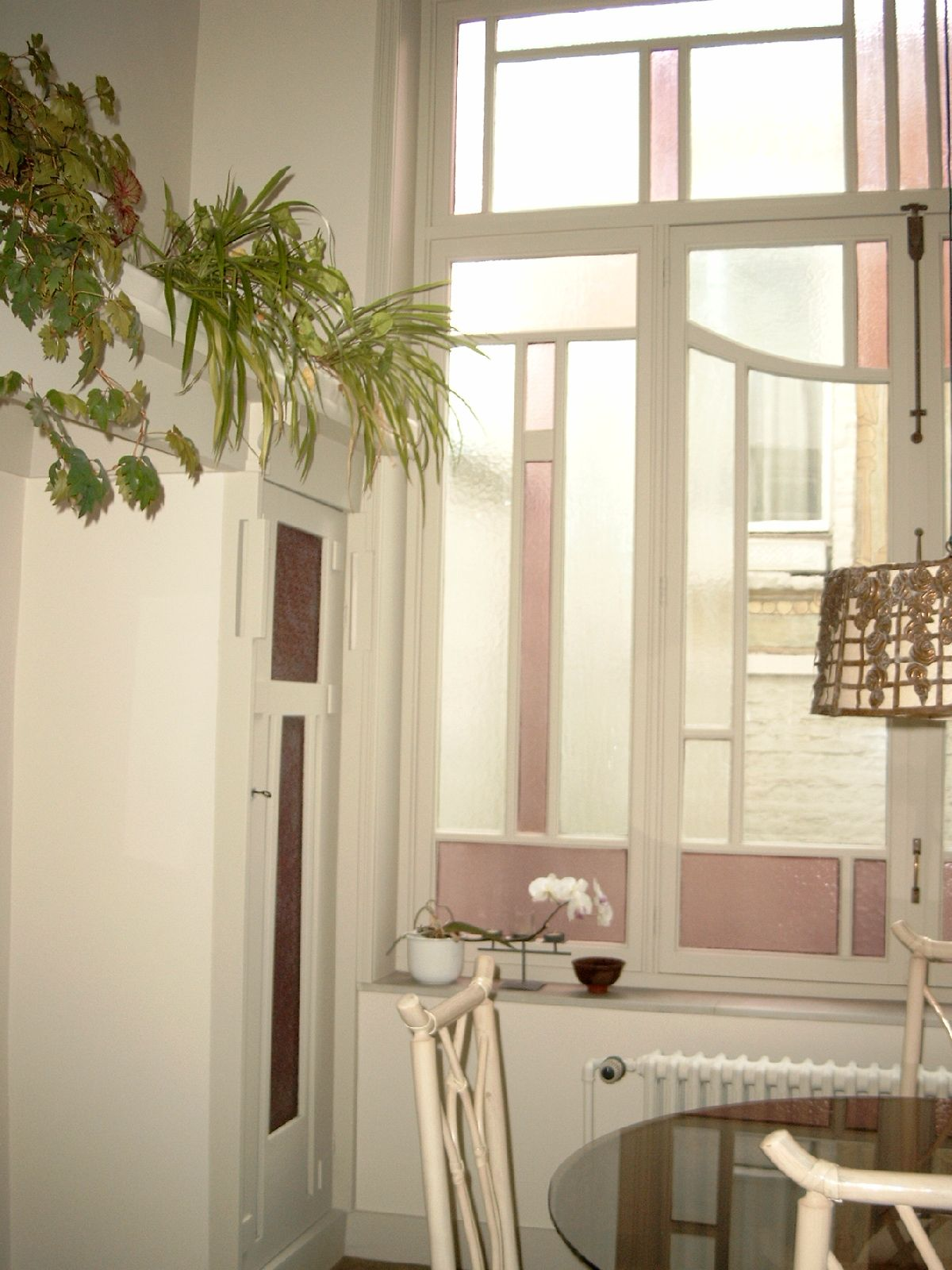 Interieur Maison Cauchie, Brussel, 1905